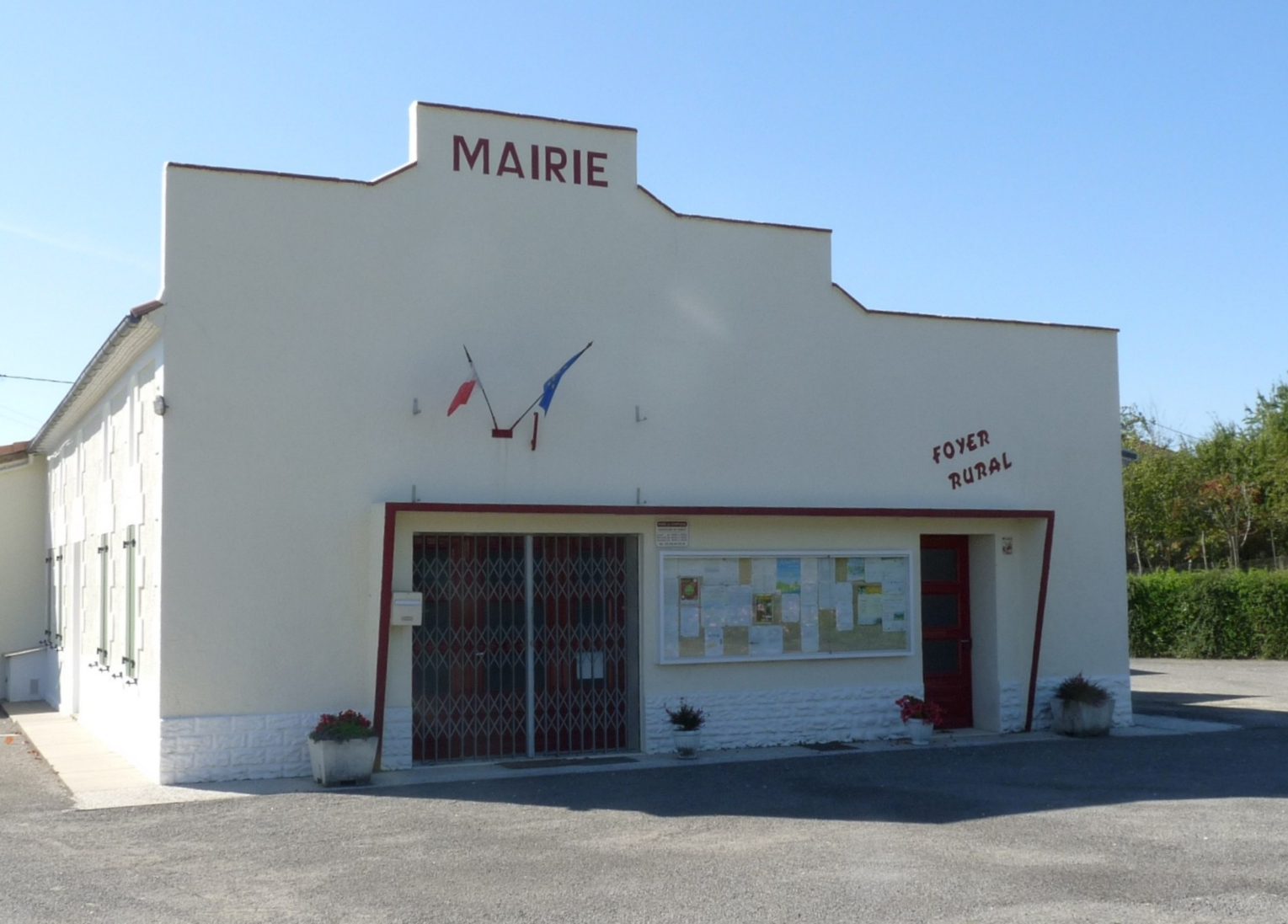 Mairie de Chartuzac, Charente-Maritime, France